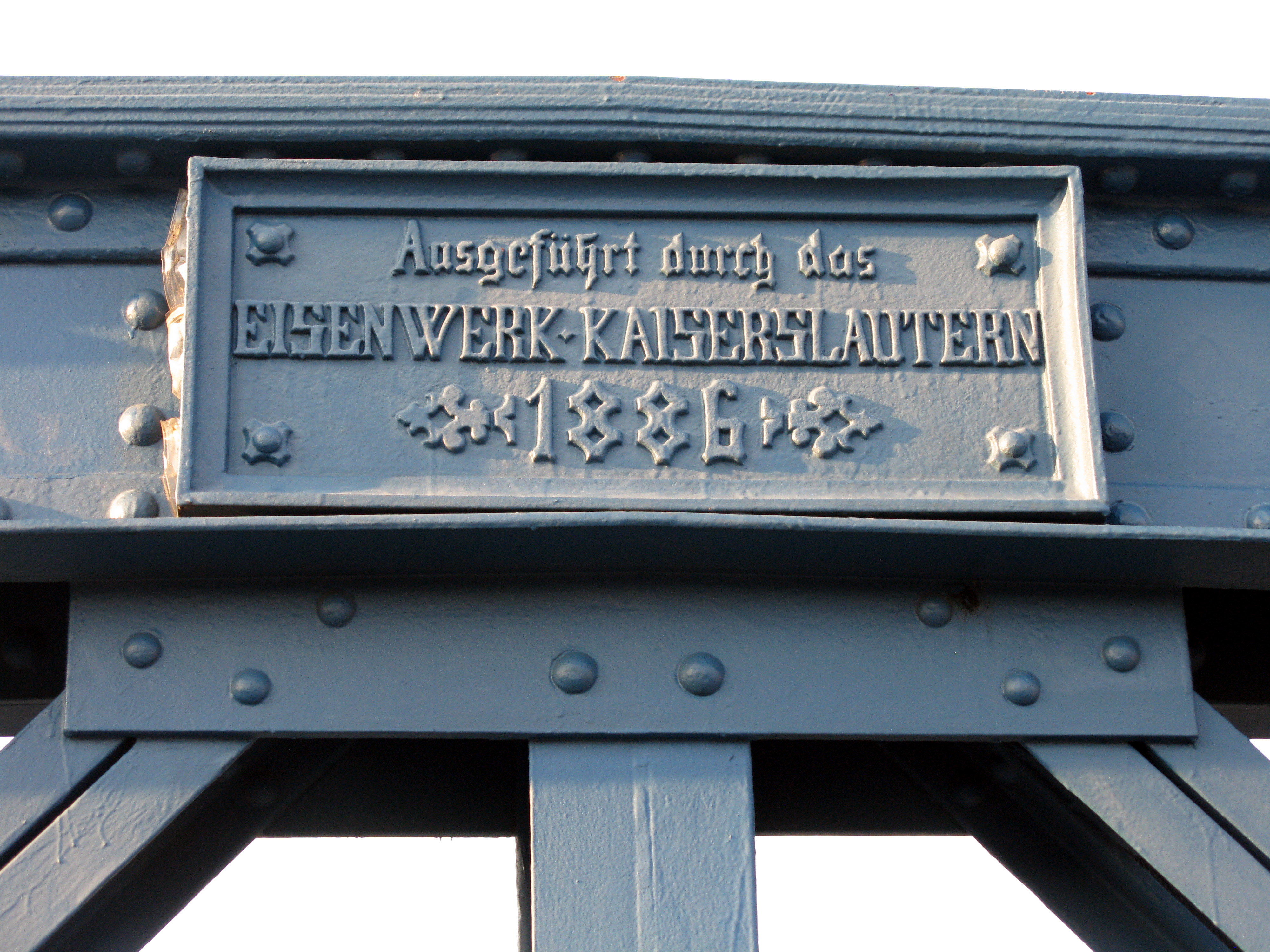 Inschrift an der Wiwilíbrücke in Freiburg: Ausgeführt durch das EISENWERK KAISERSLAUTERN 1886